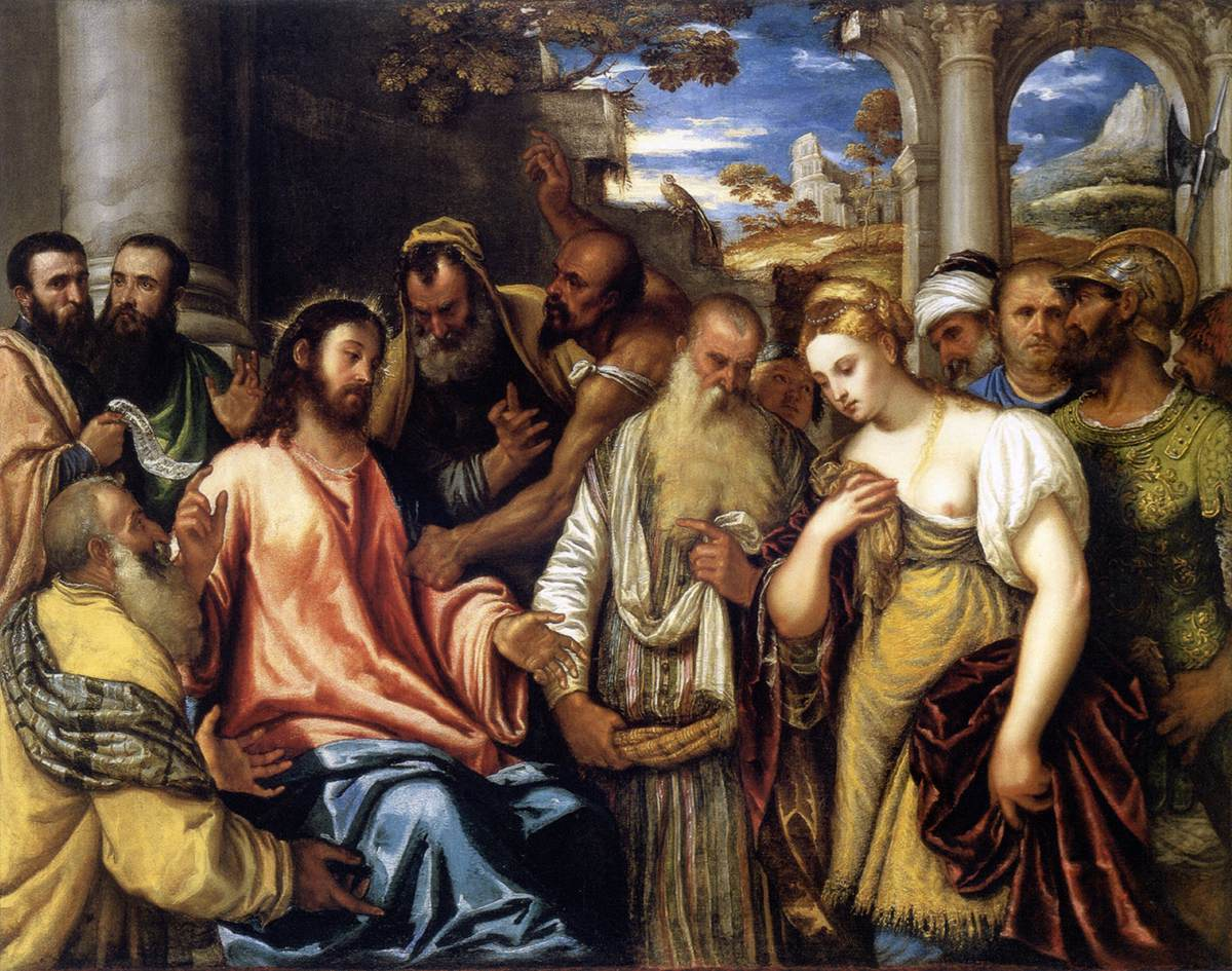 Cristo y la adúlteralabel QS:Les,"Cristo y la adúltera"